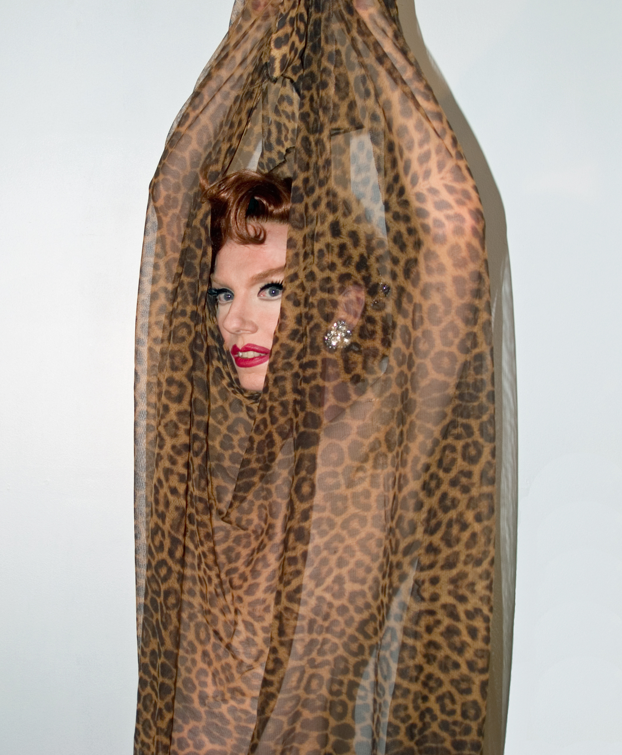 Lypsinka 1